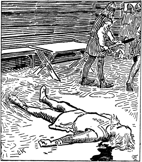 Christian Krogh: Illustration for Håkon jarls saga, Heimskringla 1899-edition. nn: «Kong Erling vert drepen.» nb: «Kong Erlings død.»